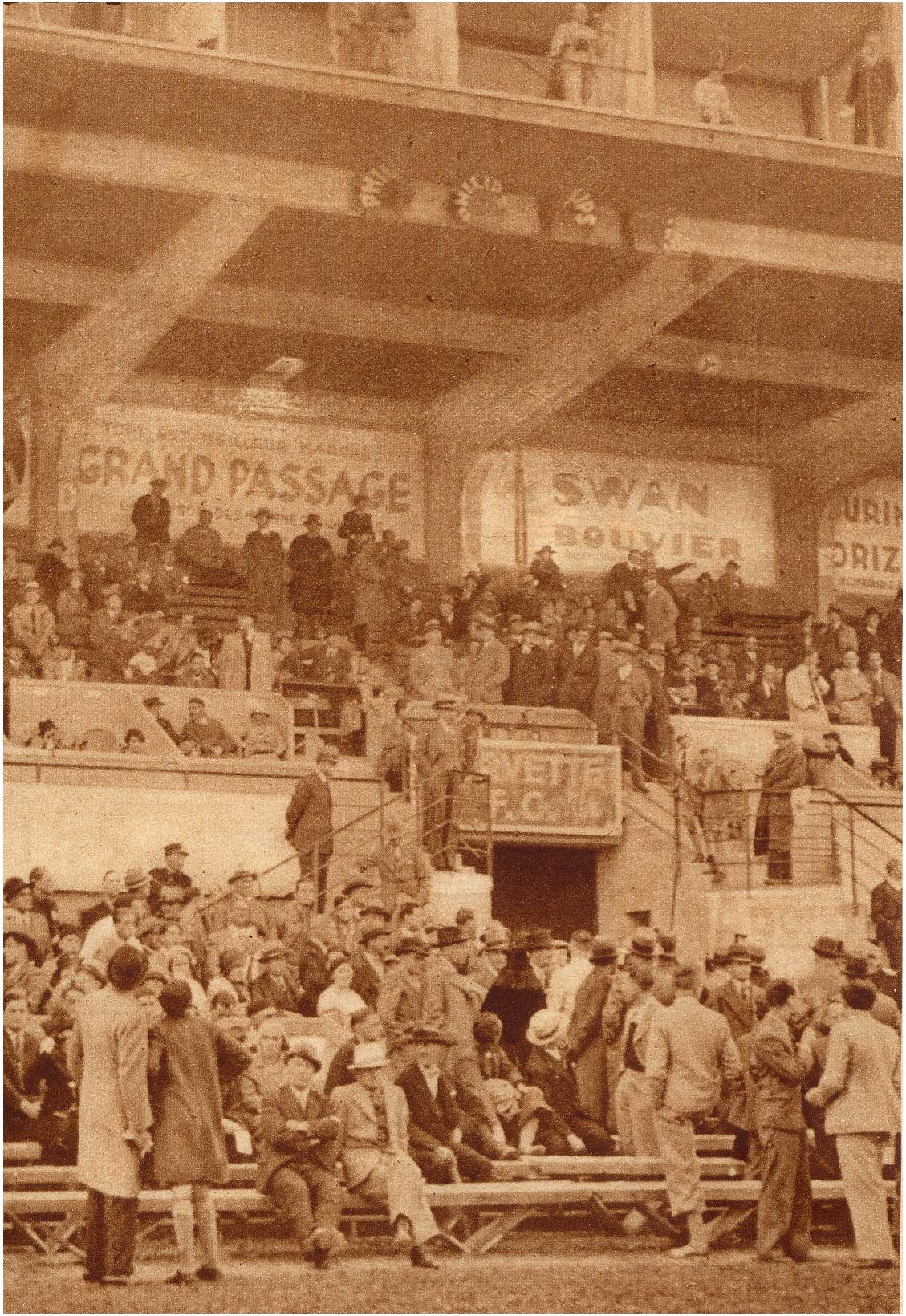 Stadion Charmilles in Genf Saison 1934/35